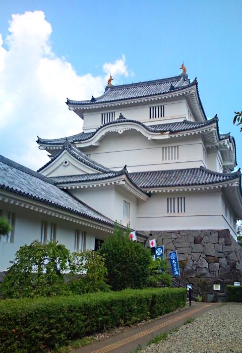 大多喜城